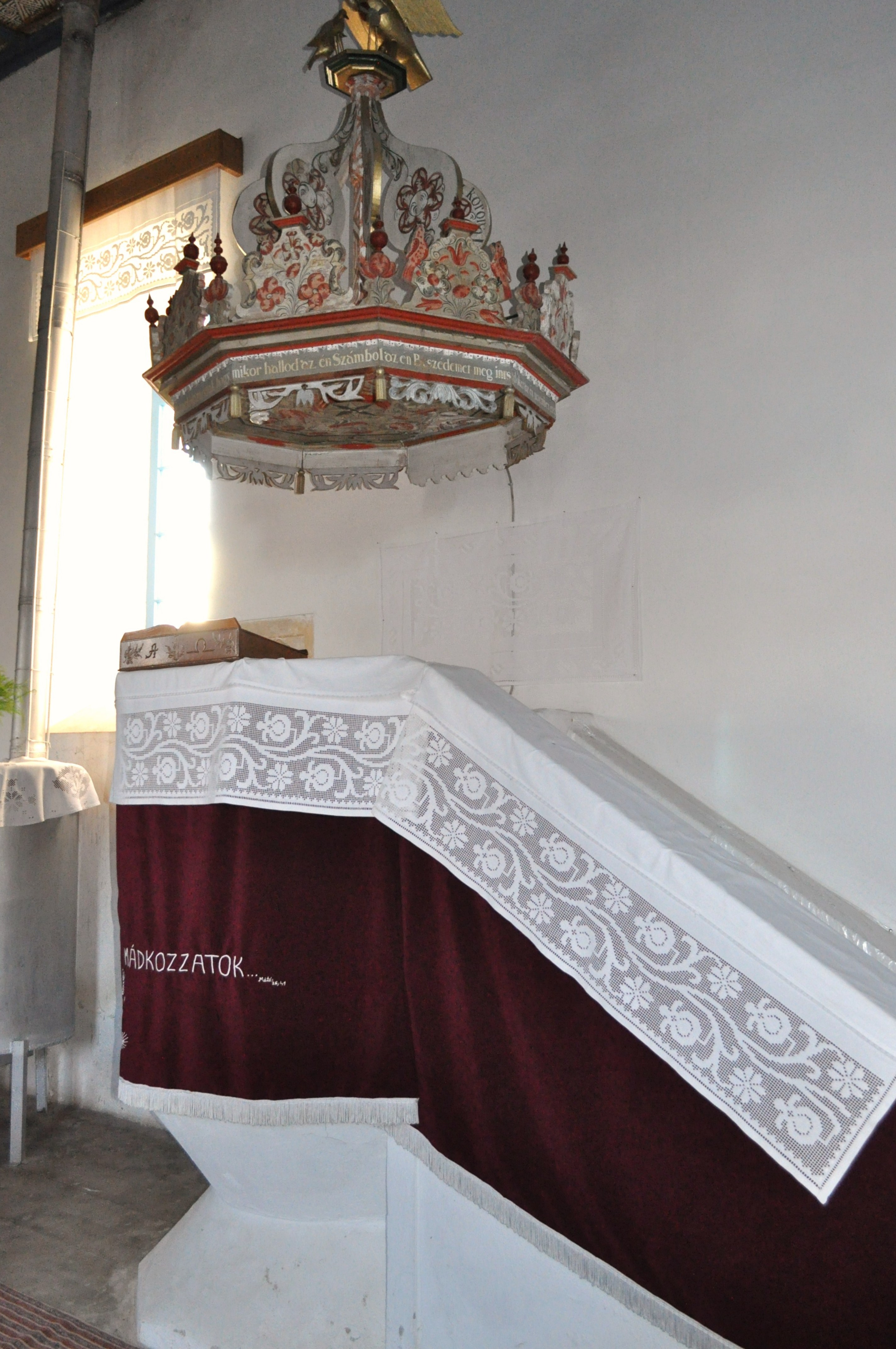 Biserica reformată, sat DUMBRAVA; comuna CĂPUŞU MARE, județul Cluj